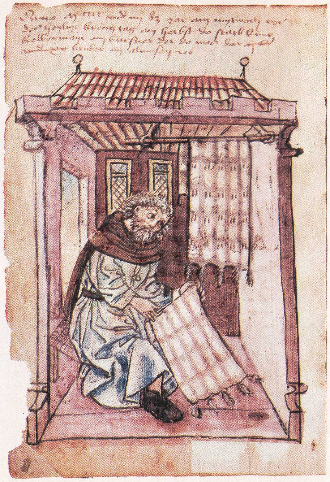 Kuncz (Kunz) Kelbermayr (Kälbermayr) , Kursner (Kürschner), an einem Fehfellwammenfutter arbeitend. Im Hintergrund ein weiteres Fehwammenfutter (Futter sind für etwa ein Pelzteil vorbereitete Felltafeln). Transkription und weitere Informationen